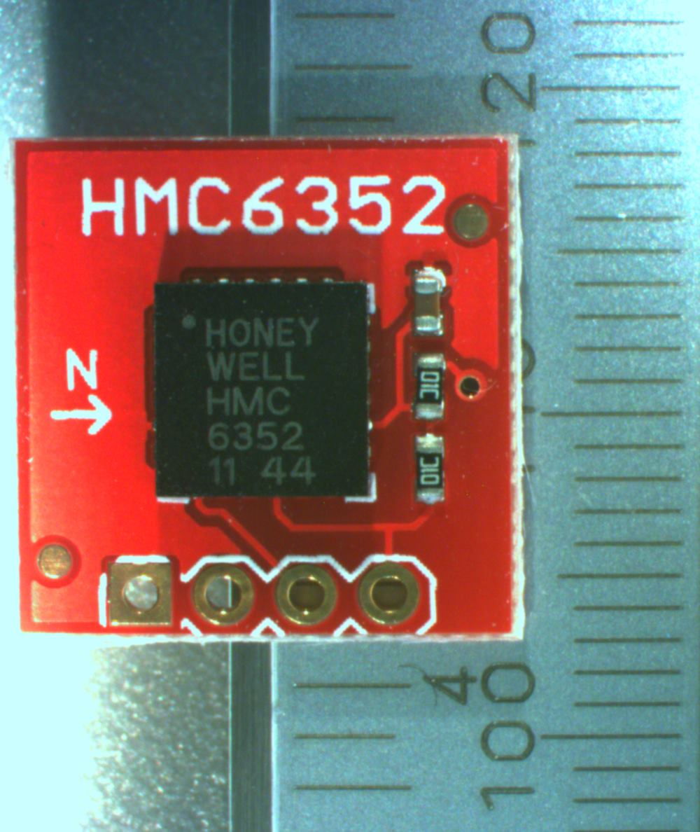 Elektronischer Kompass HMC6352 mit Serial Peripheral Interface als kleines Leiterplattenmodul